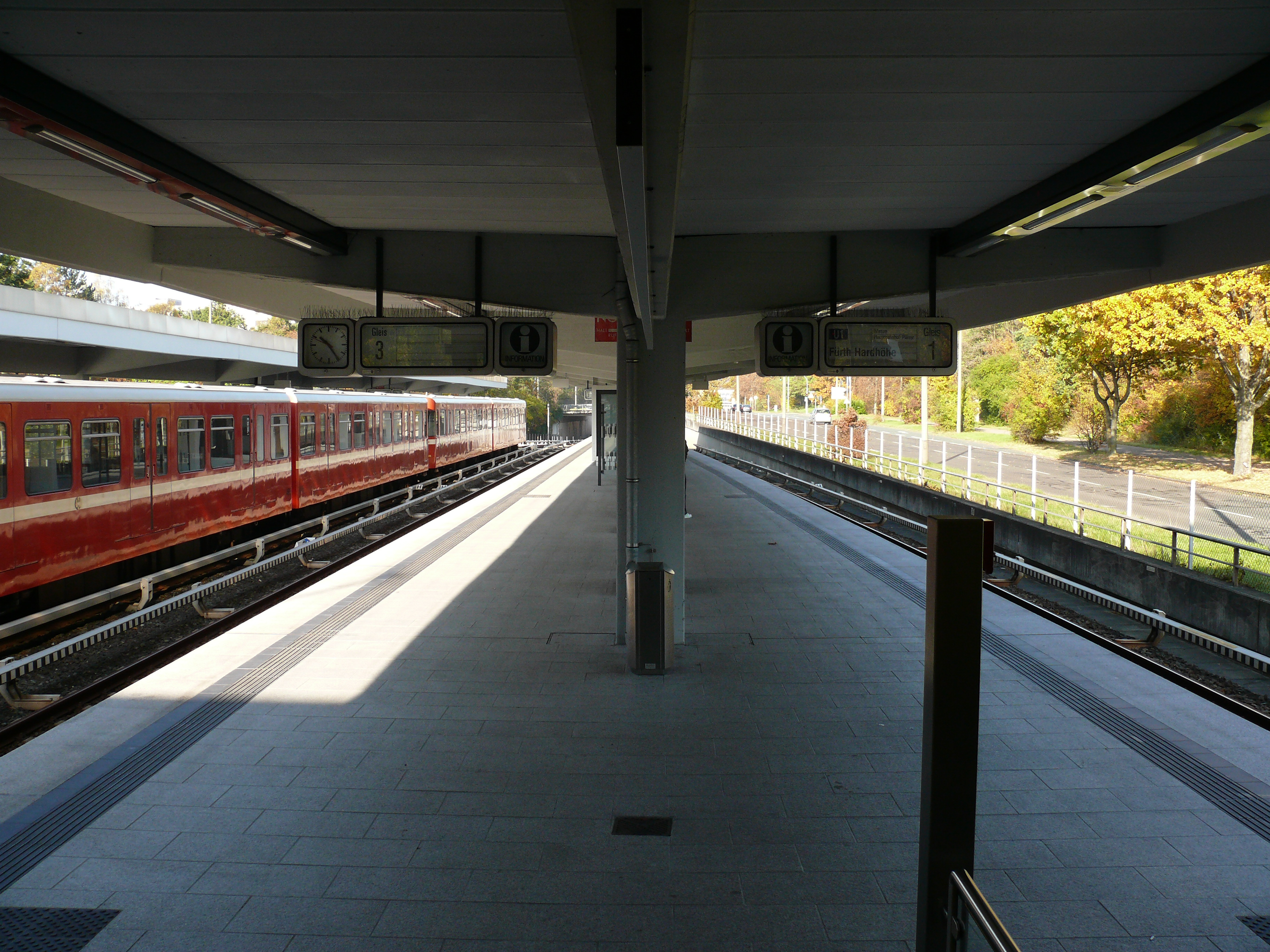 Blick auf die Bahnsteigebene am oberirdischen U-Bahnhof Scharfreiterring in Nürnberg. Hier der Bahnsteig Richtung Fürth, links der Bahnsteig Richtung Langwasser-Süd.